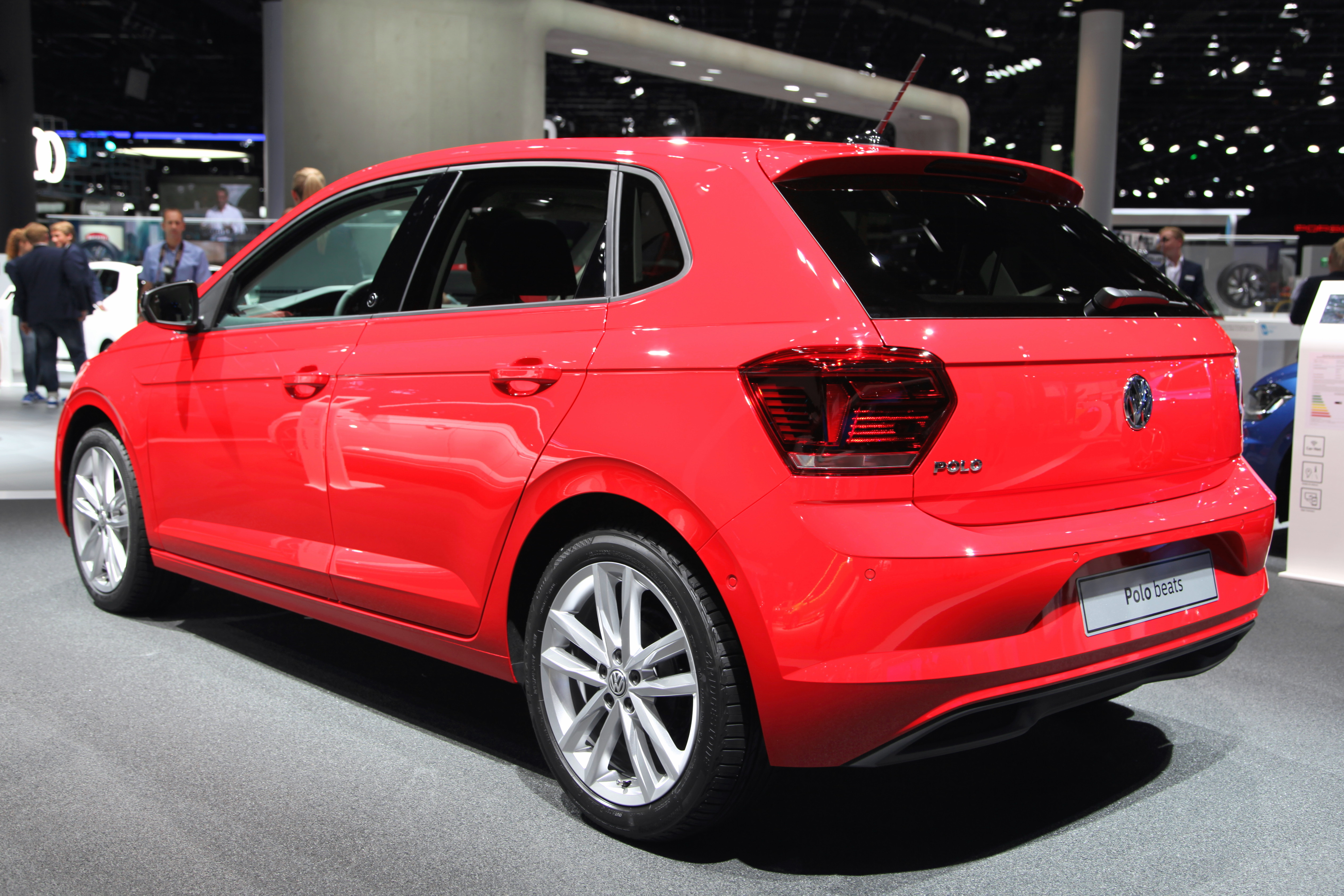 VW Polo Beats